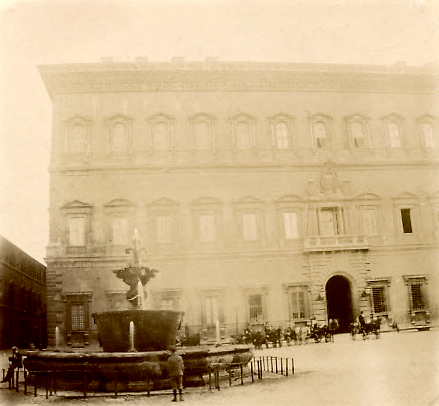 Rome, la place et le palais Farnèse, vers 1900. Le palais Farnèse abritait l'ambassade de France en Italie et l'École française de Rome (2e étage).